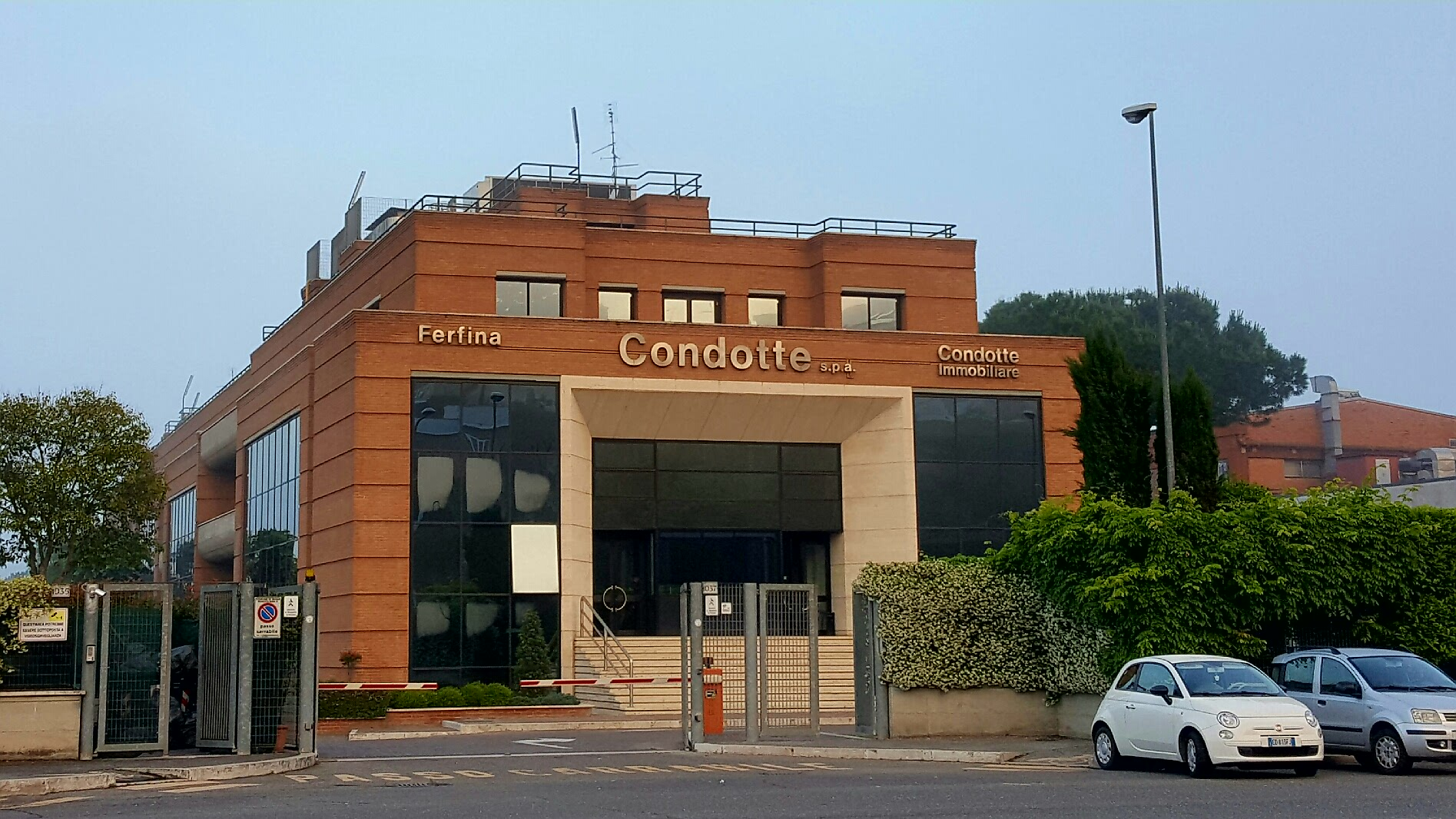 Sede di Condotte d'acqua a Roma, in via Salaria.